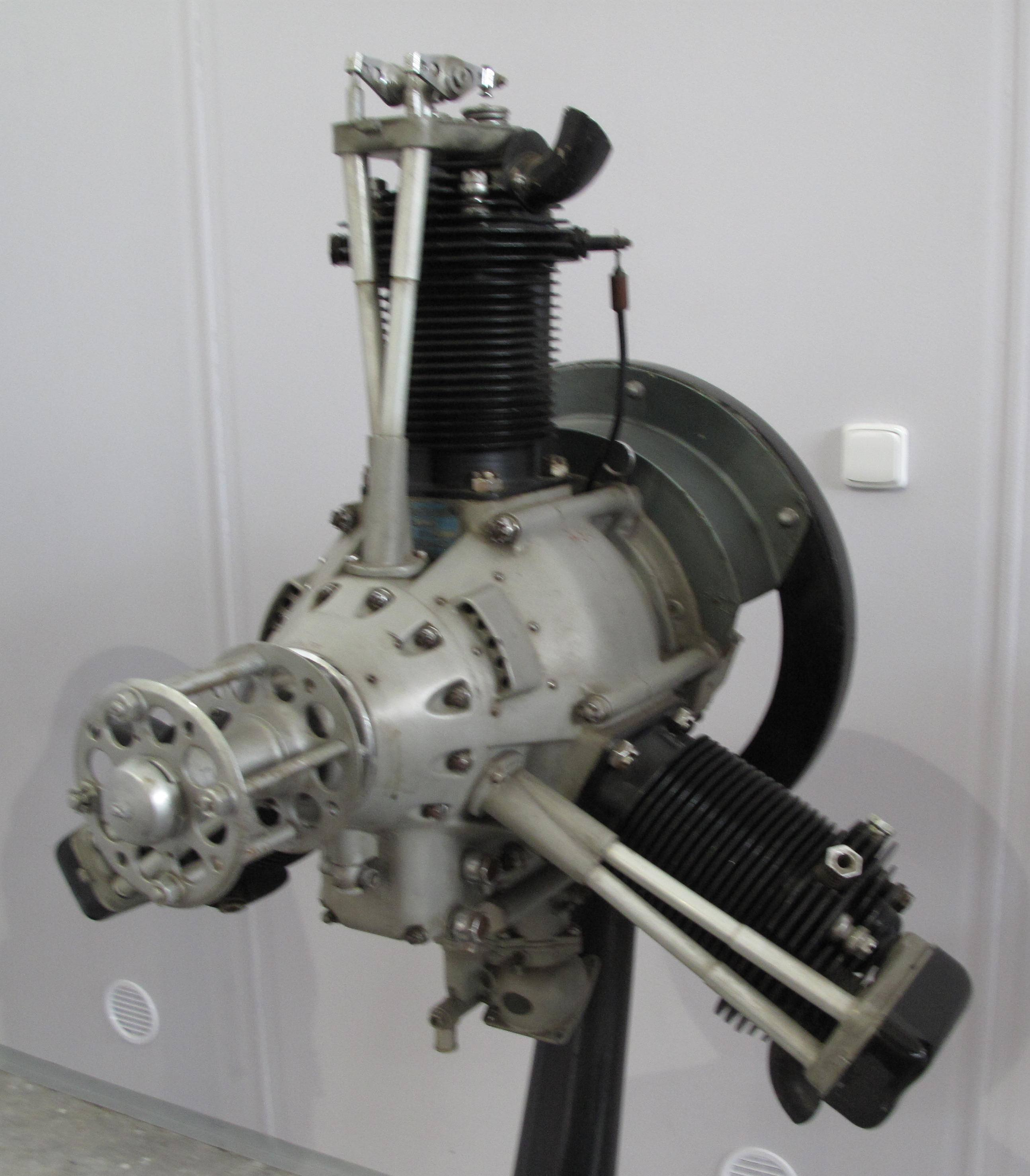 Letecké muzeum Kbely